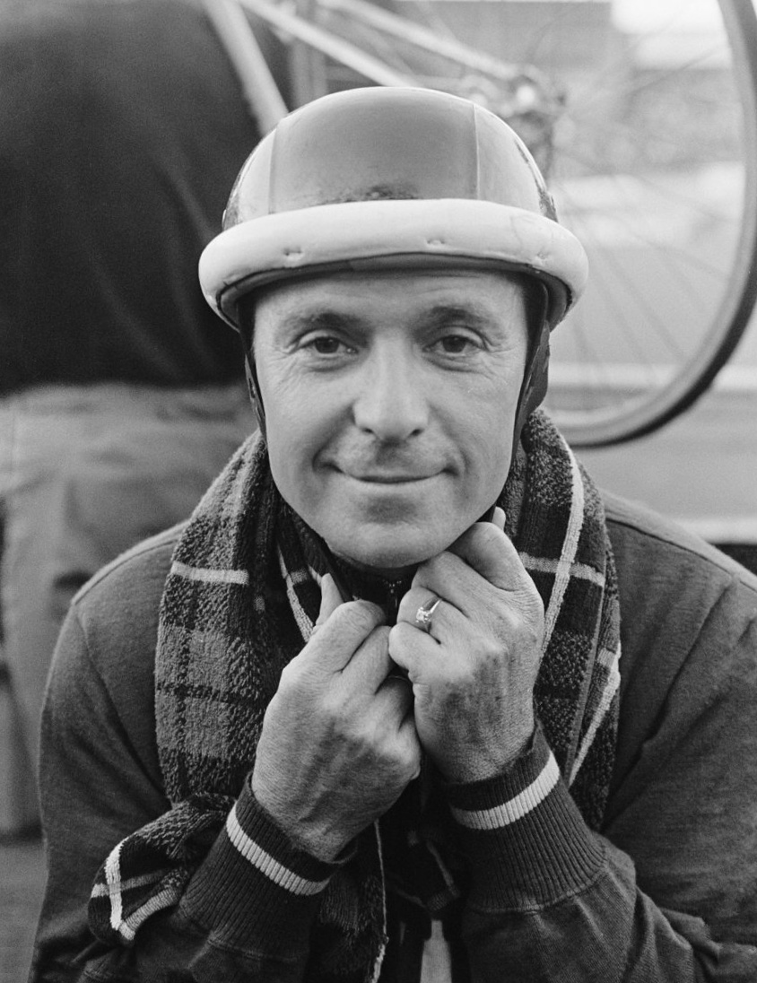 Grote prijs van Amsterdam, Wereldkampioen stayeren Guillermo Timoner